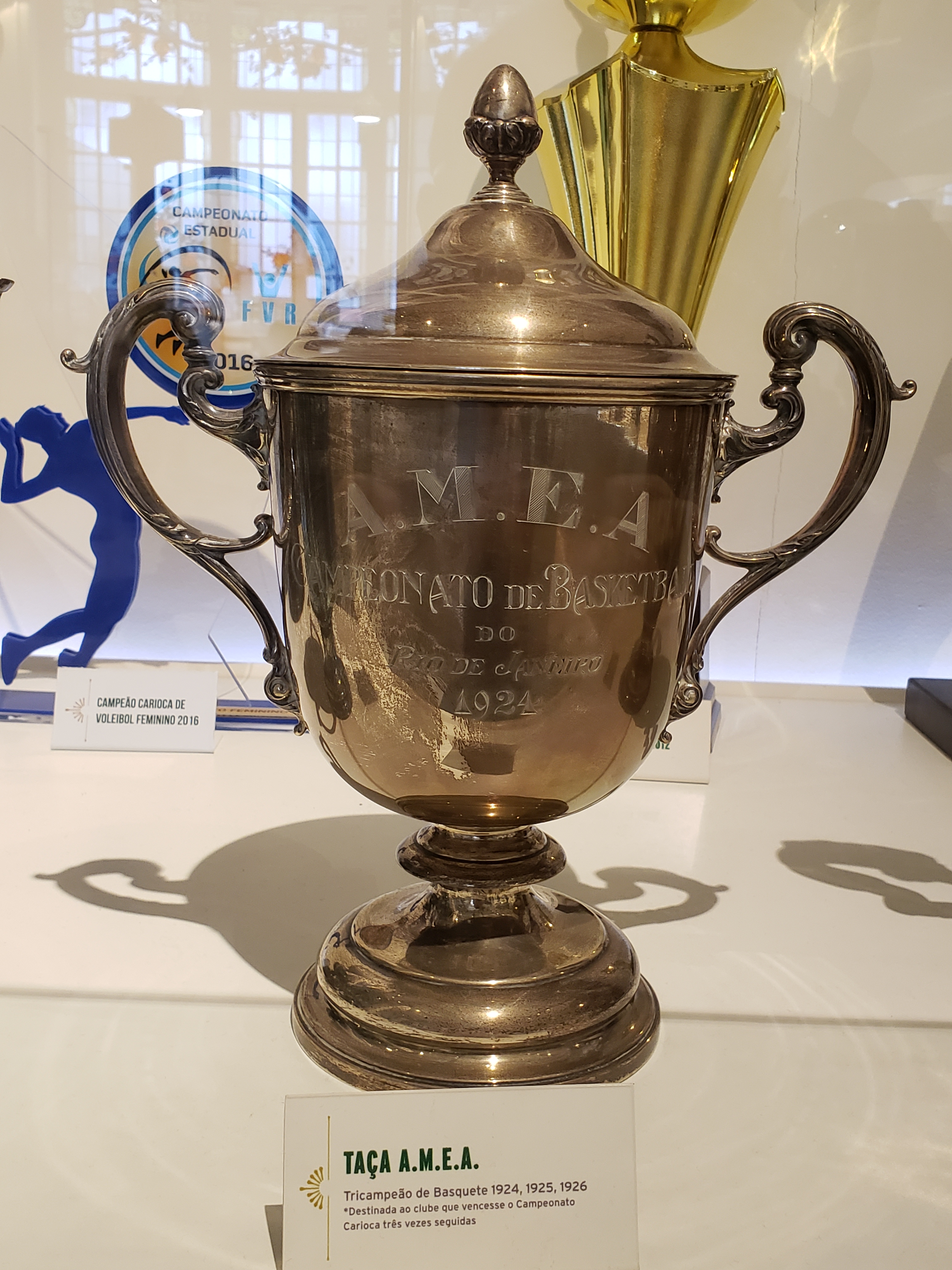 Taça destinada ao clube que se sagrasse campeão carioca de basquete por 3 vezes consecutivas e conquistada pelo Fluminense Football Club.